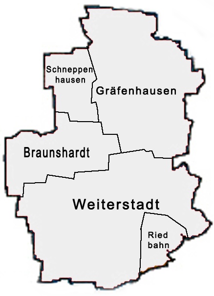 Weiterstädter Stadtaufteilung